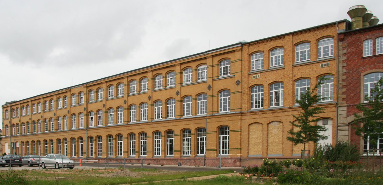 Papierfabrik (jetzt Technocell Dekor) Penig